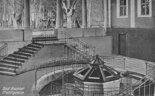 Der Bad Bockleter Brunnen (Stahlquelle) vor seiner Modernisierung